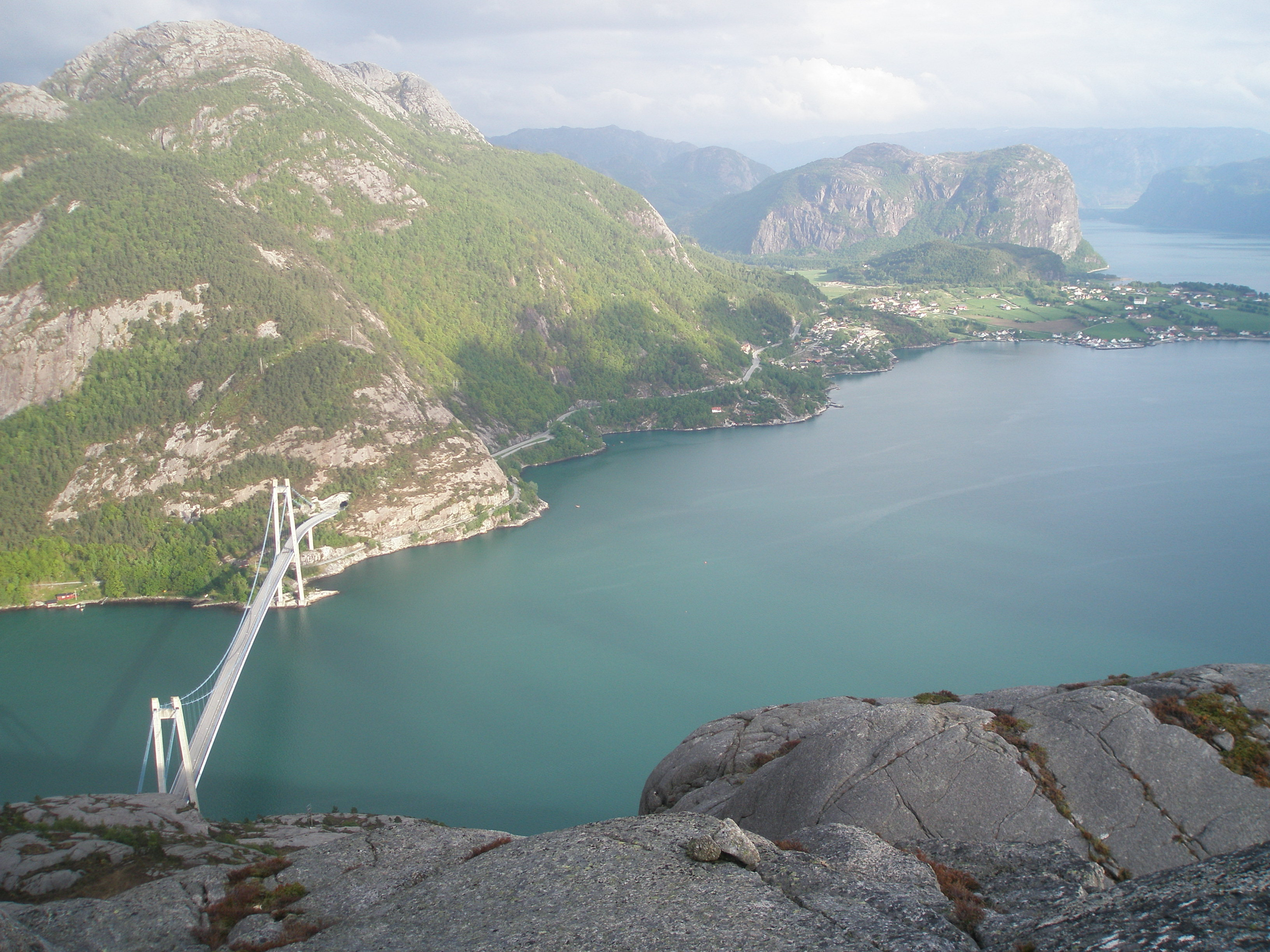 Broen over Lysefjorden i Rogaland sett fra Sokkanuten ( 341 m.o.h.). Oppe til høyre i billedet ligger Forsand, med Uburen (440 m.o.h.) i bakgrunnen.